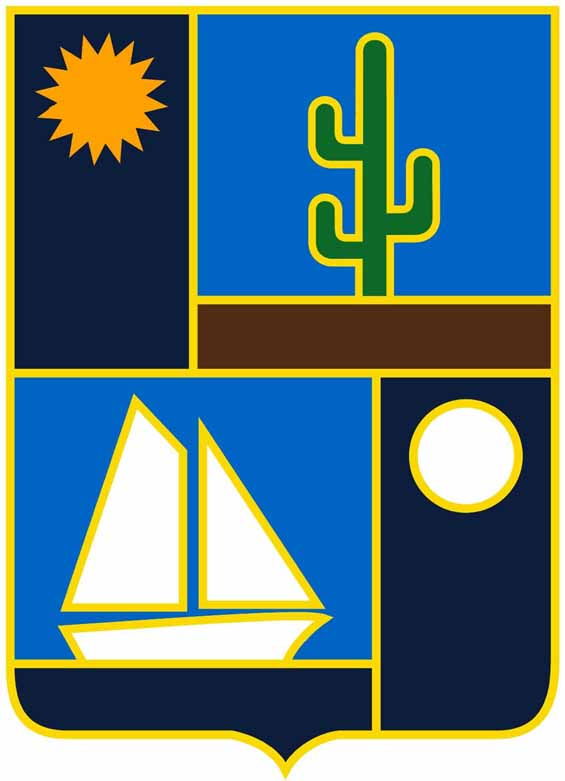 Escudo El Quisco